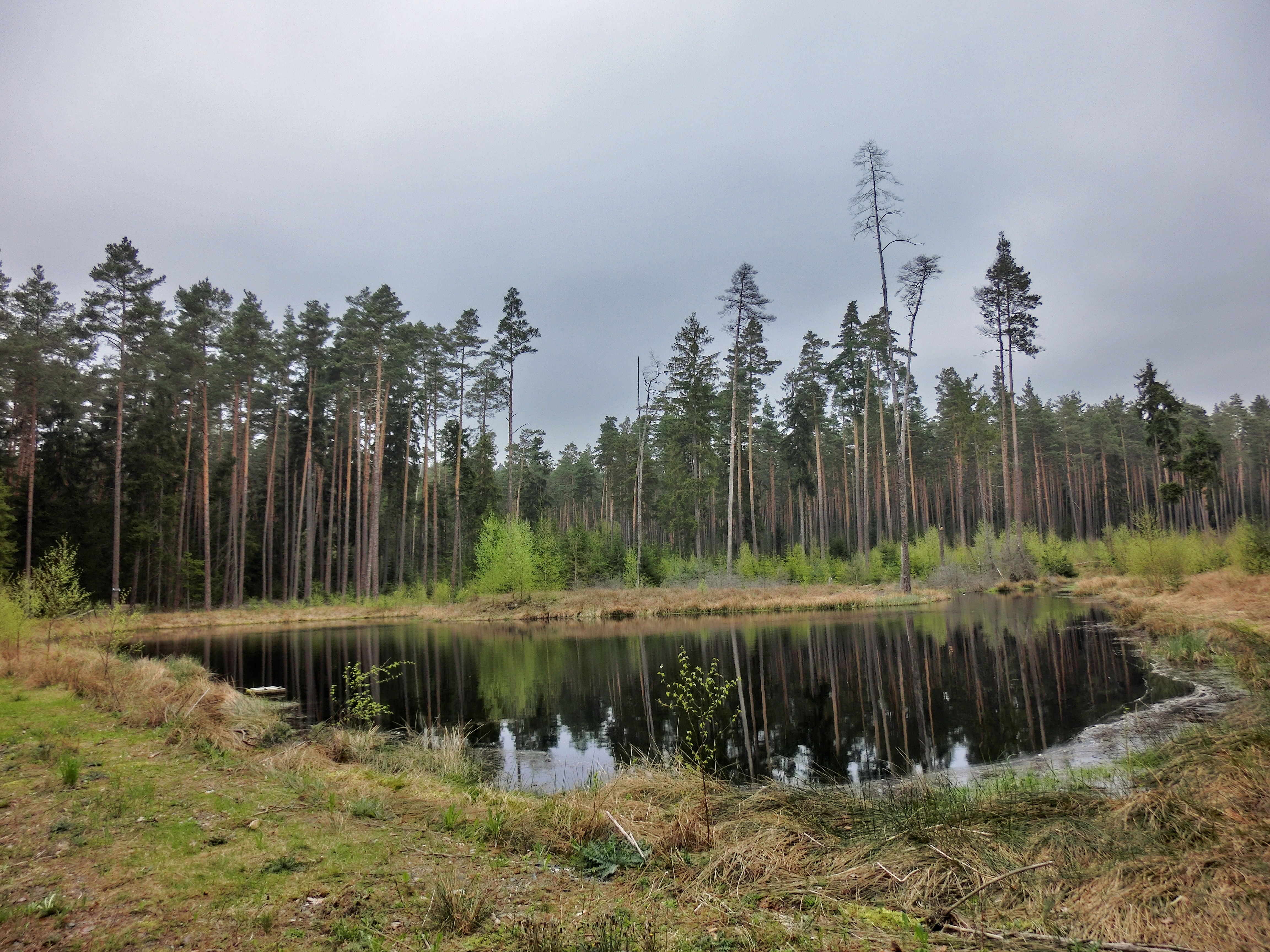 Süßenweiher